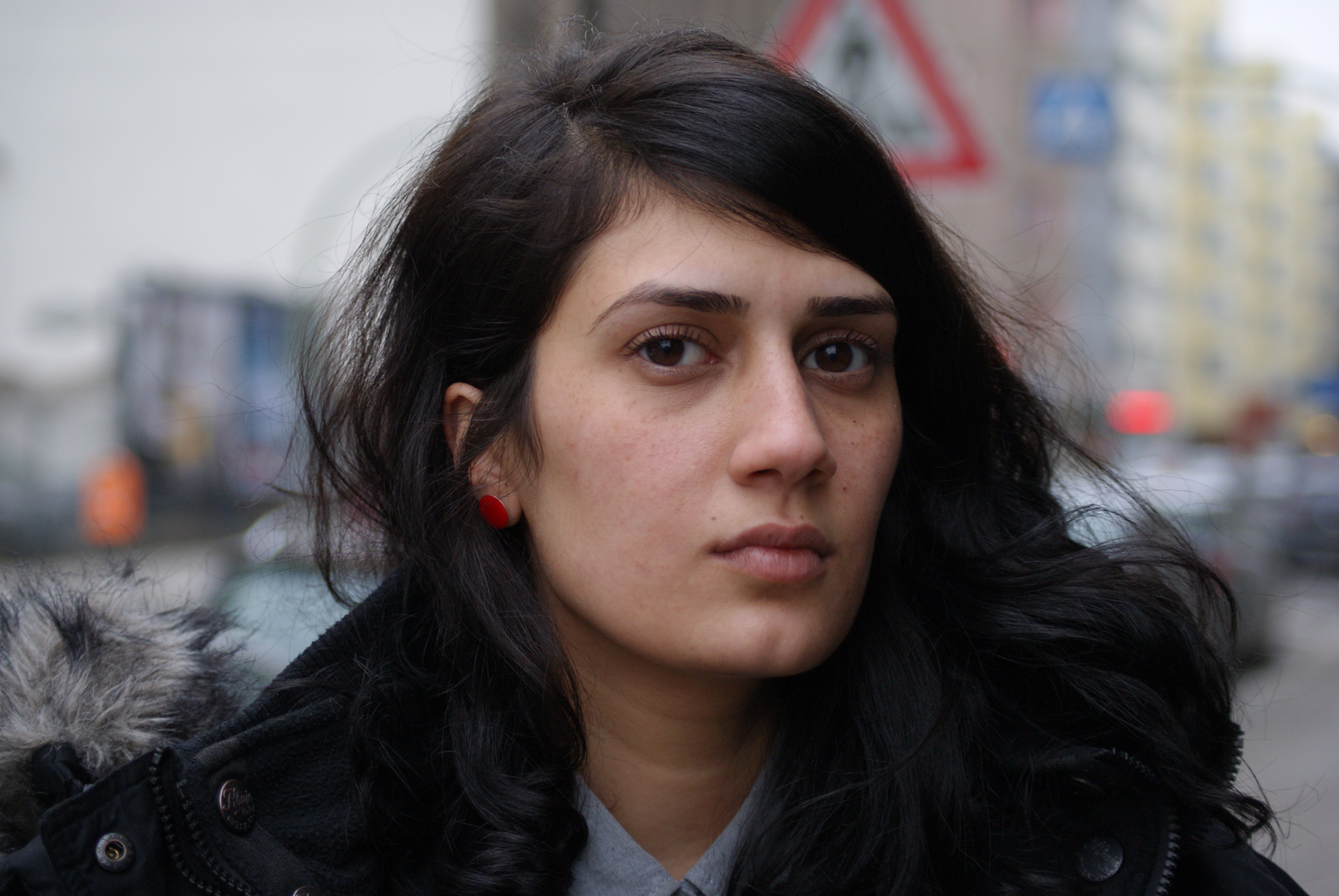 Portrait von Fatma Aydemir, 2015 in Berlin